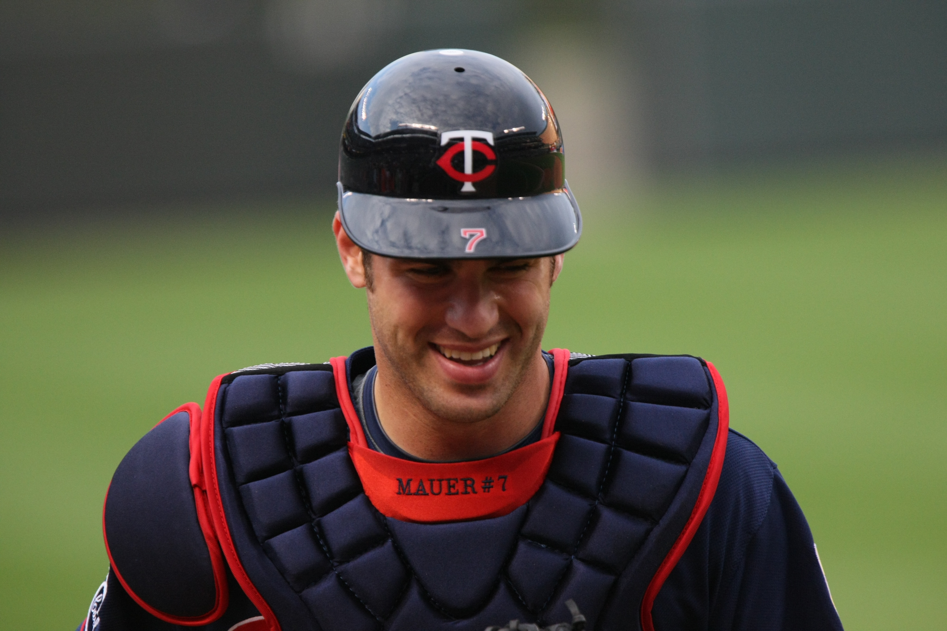 Joe Mauer